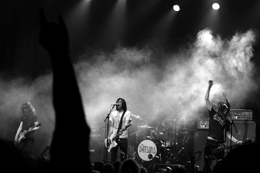 The Datsuns au Het Depot, Louvain